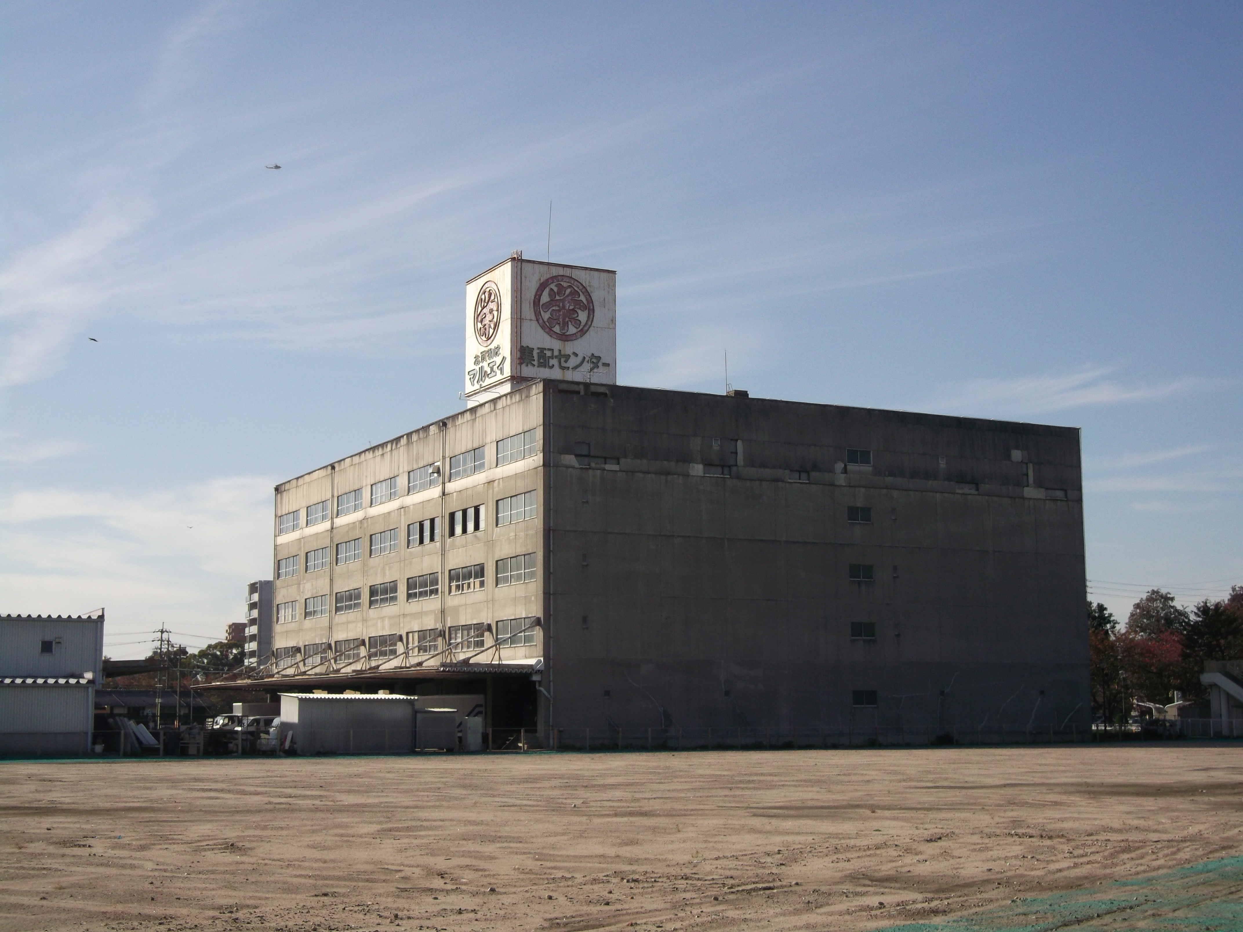 名古屋市北区柳原の丸榮百貨店柳原配送センターを西側公道より撮影